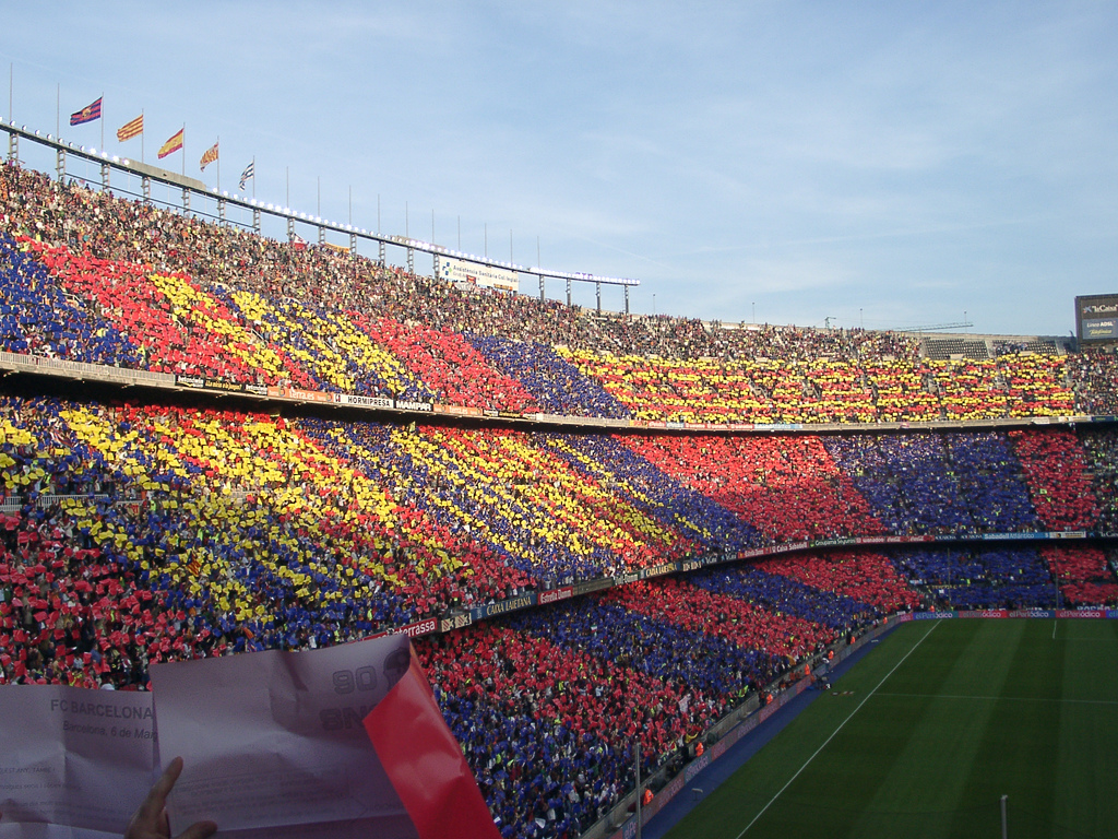 Camp Nou